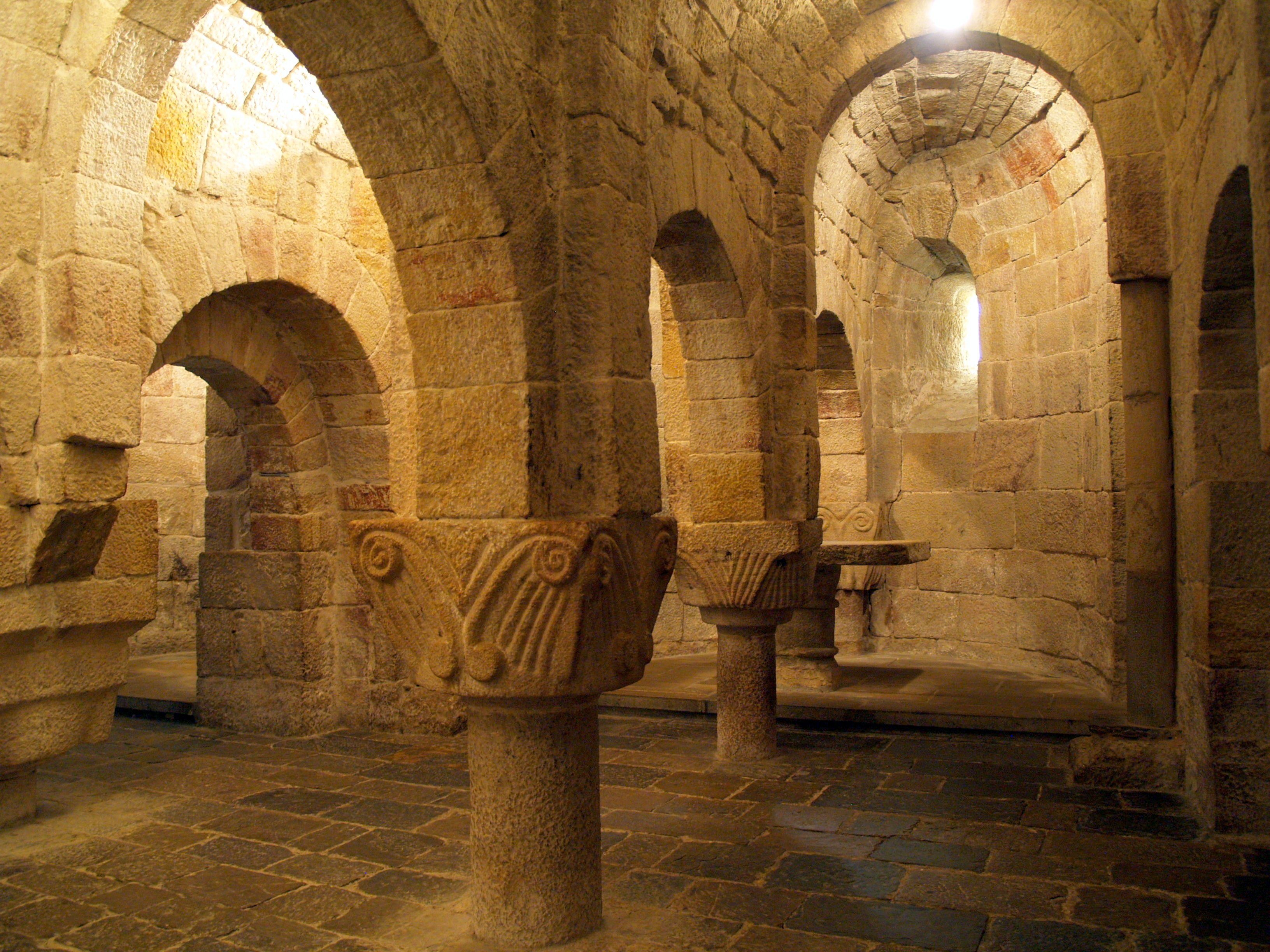 Monestir de Leyre - Església - Cripta S.XII